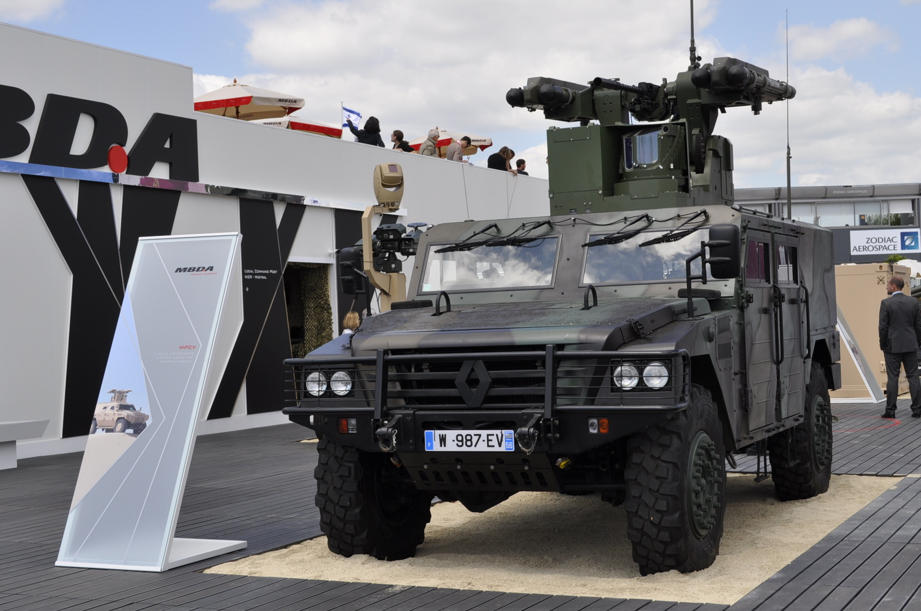 Véhicule de marque Renault surmonté d'une tourelle qui porte des lanceurs de missiles Mistral et une mitrailleuse (au centre). Photo prise à l'aire Exposition MBDA au salon du Bourget 2015